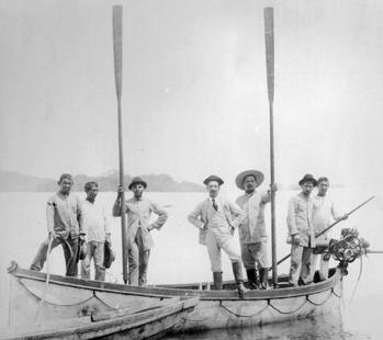 Carlos Chagas, em sua expedição pela Amazônia